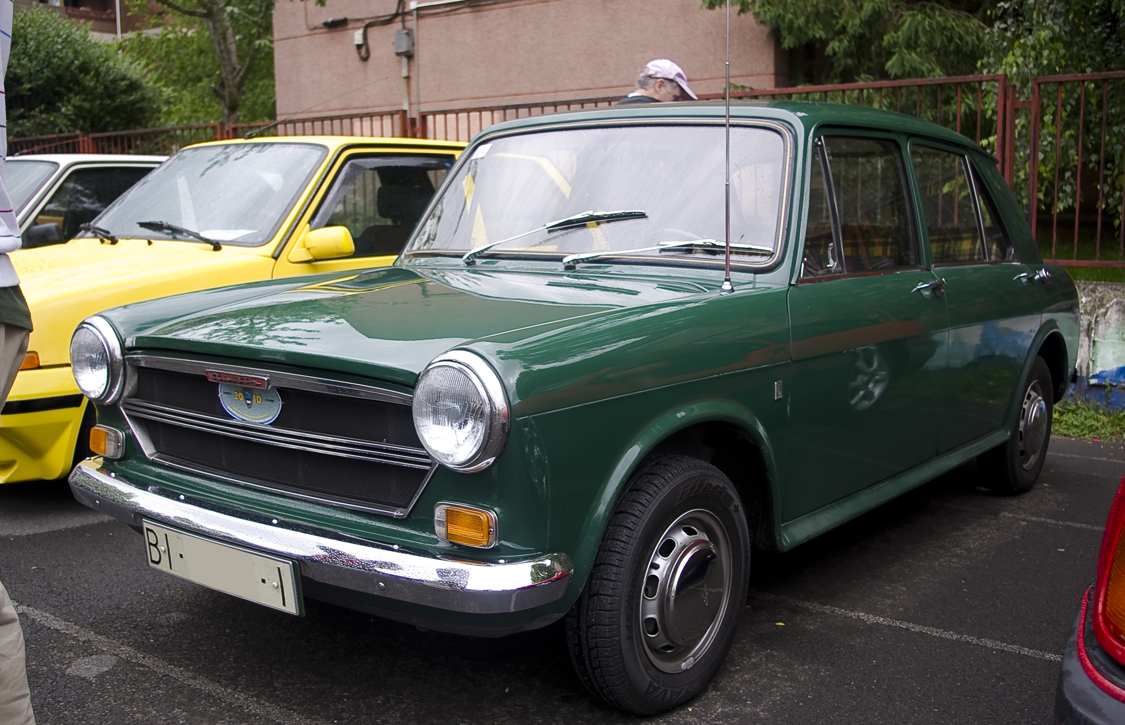 1975 Austin De Luxe [ADO16]